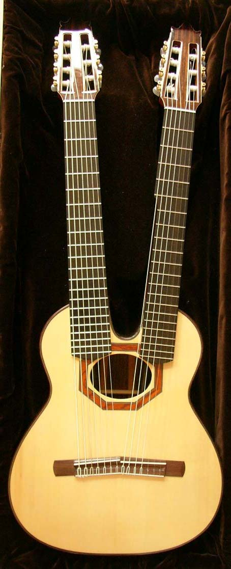 Doppelhalsgitarre